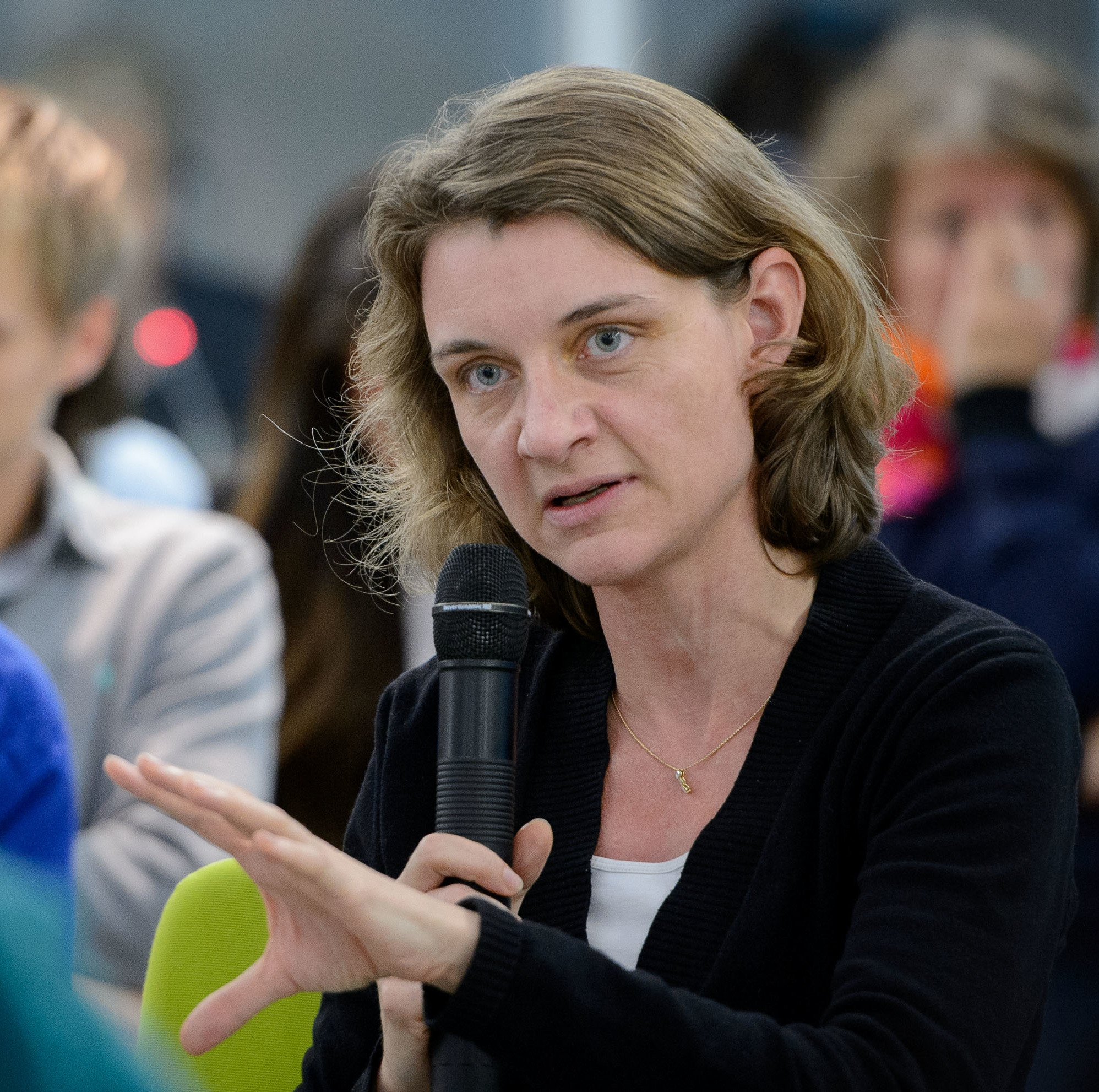 Daniela Schwarzer (Stiftung Wissenschaft und Politik, SWP, Berlin)